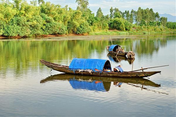 Sông Vĩnh Định thuộc địa bàn xã Triệu Thành - Triệu Phong - Quảng Trị